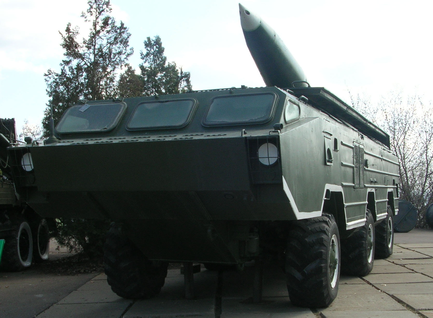 Парк Победы, г. Саратов.